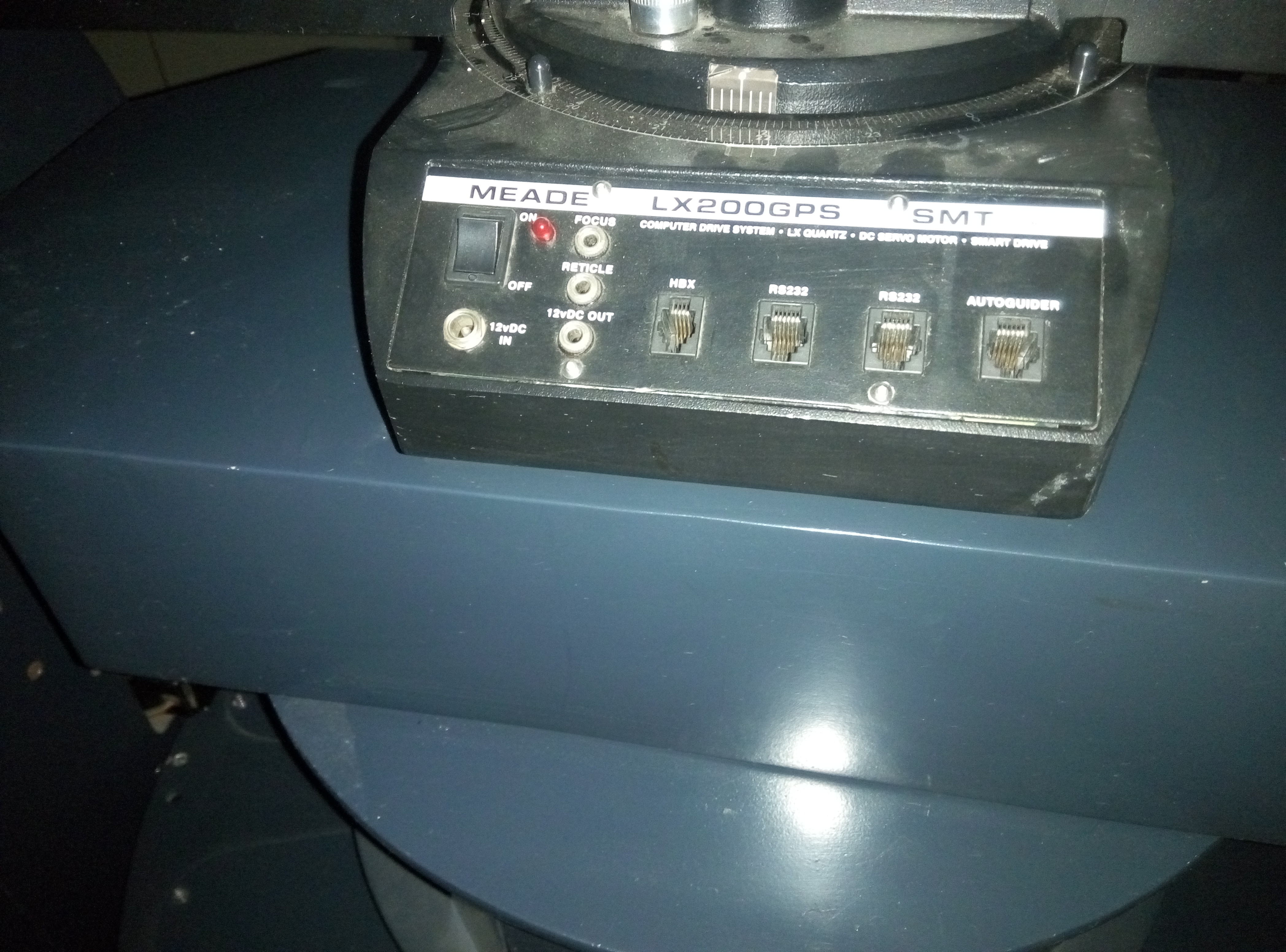 Meade LX200 in Jiamusi University Observatory,Shoot on Sep 27，2017.